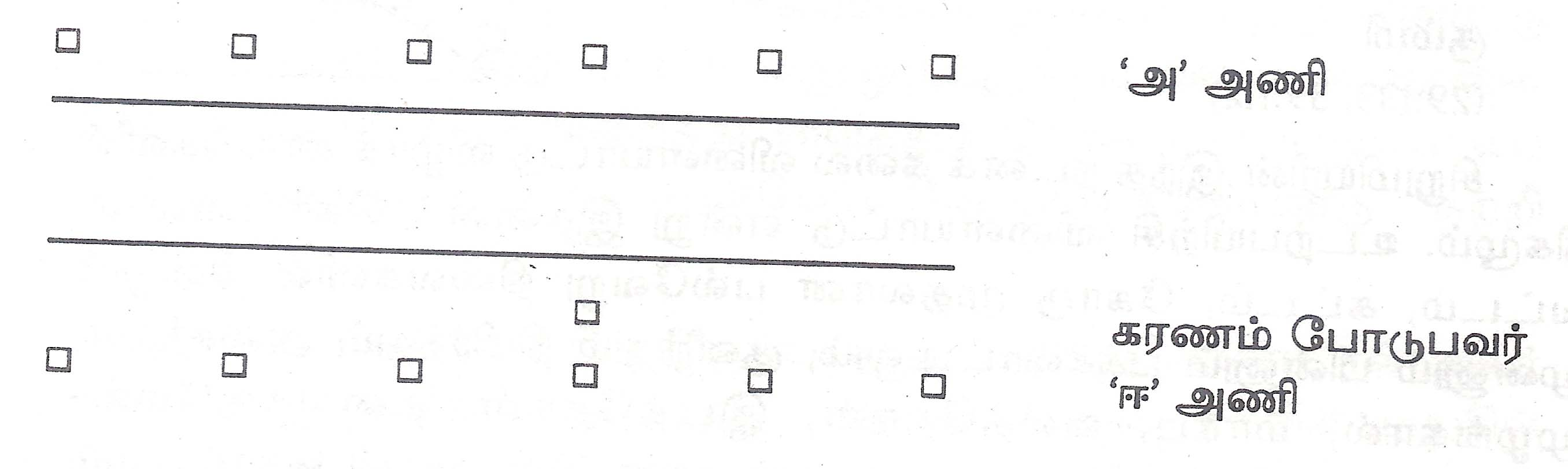 சொந்தப் படம். 'மறைகின்ற விளையாட்டுகள்' என்னும் எனது நூலிலிருந்து எடுக்கப்பட்டது. கரணம் போட்டுக் காலால் துணிப்பந்து வீசி விளையாடும் 'குதிரைக்குக் காணம் காட்டல் விளையாட்டு' அரங்கம்.